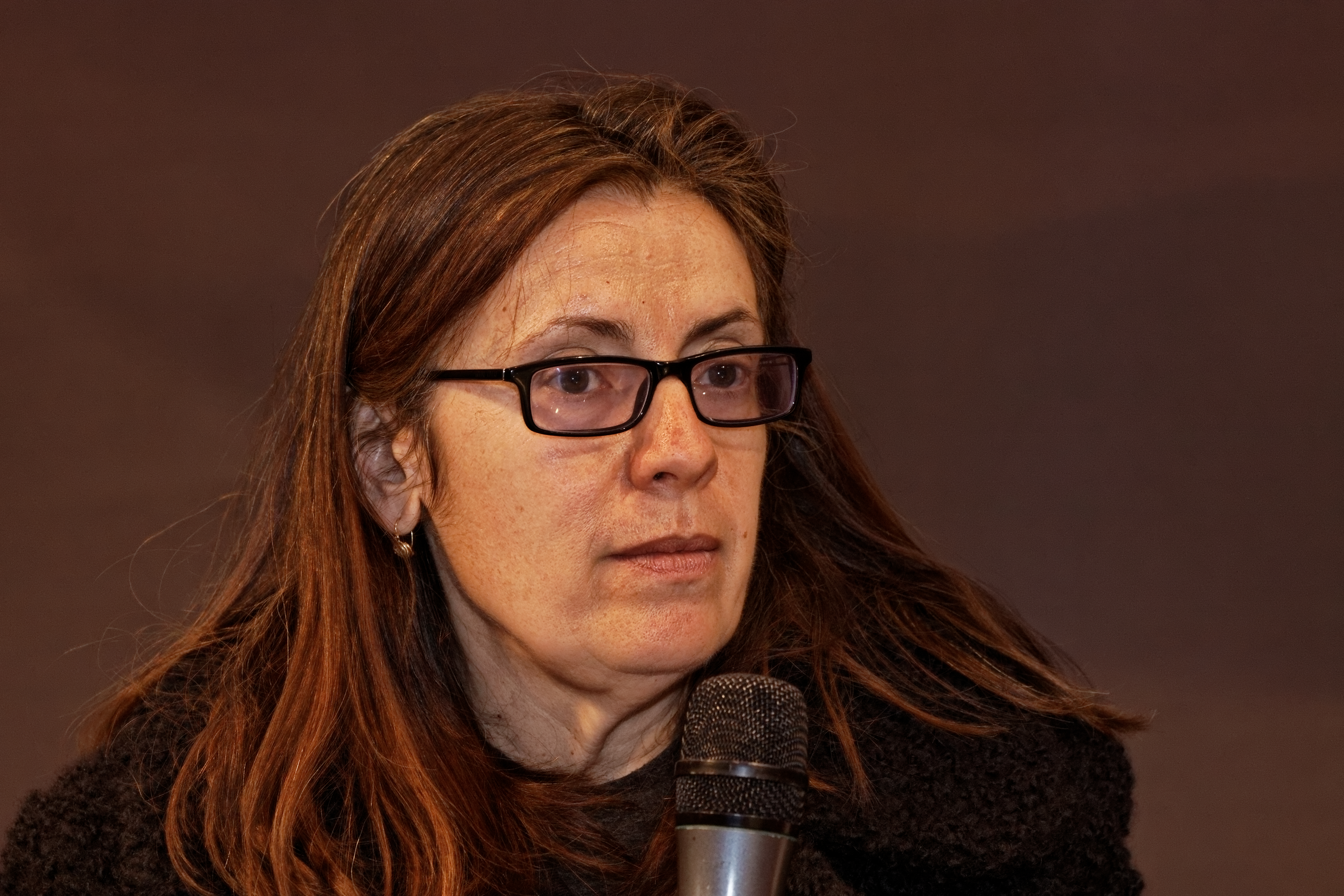 Milena Agus en conférence au salon du livre de Paris 2012.